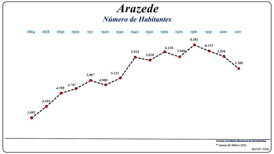 População